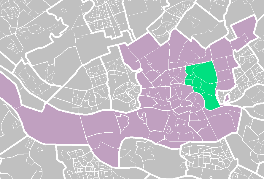 Rotterdam districts/neighboorhoods